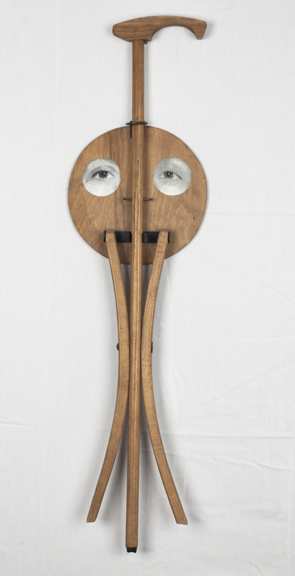 Podróżnik to żartobliwy autoportret – starodawny, drewniany, rozkładany taboret „ożywiają” przyklejone do okrągłego siedziska fotografie oczu artystki. Geta Brătescu często sięga po przedmioty z najbliższego otoczenia, sprzęty domowe, które, nosząc różne historie, tworzą jej osobistą mitologię. Ważny jest ich związek z domem-pracownią, którą artystka traktuje nie tylko jako miejsce pracy, ale jako swoje alter ego. Dla Brătescu, która uwielbiała podróżować i prowadziła rodzaj dziennika w formie notatników-kolaży, podróż jest metaforą stanu mentalnego, w którym czas i przeżycia ulegają nawarstwieniu.